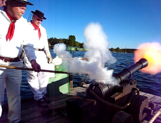 kanonenfeuer_mueritsail